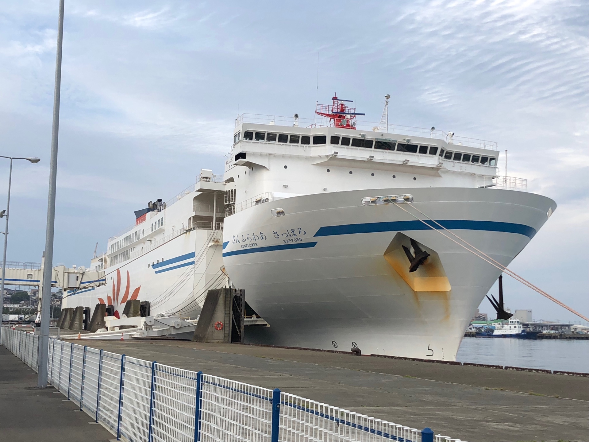 さんふらわあ さっぽろ(3代目)。 茨城港大洗港区にて。2018年5月12日撮影。